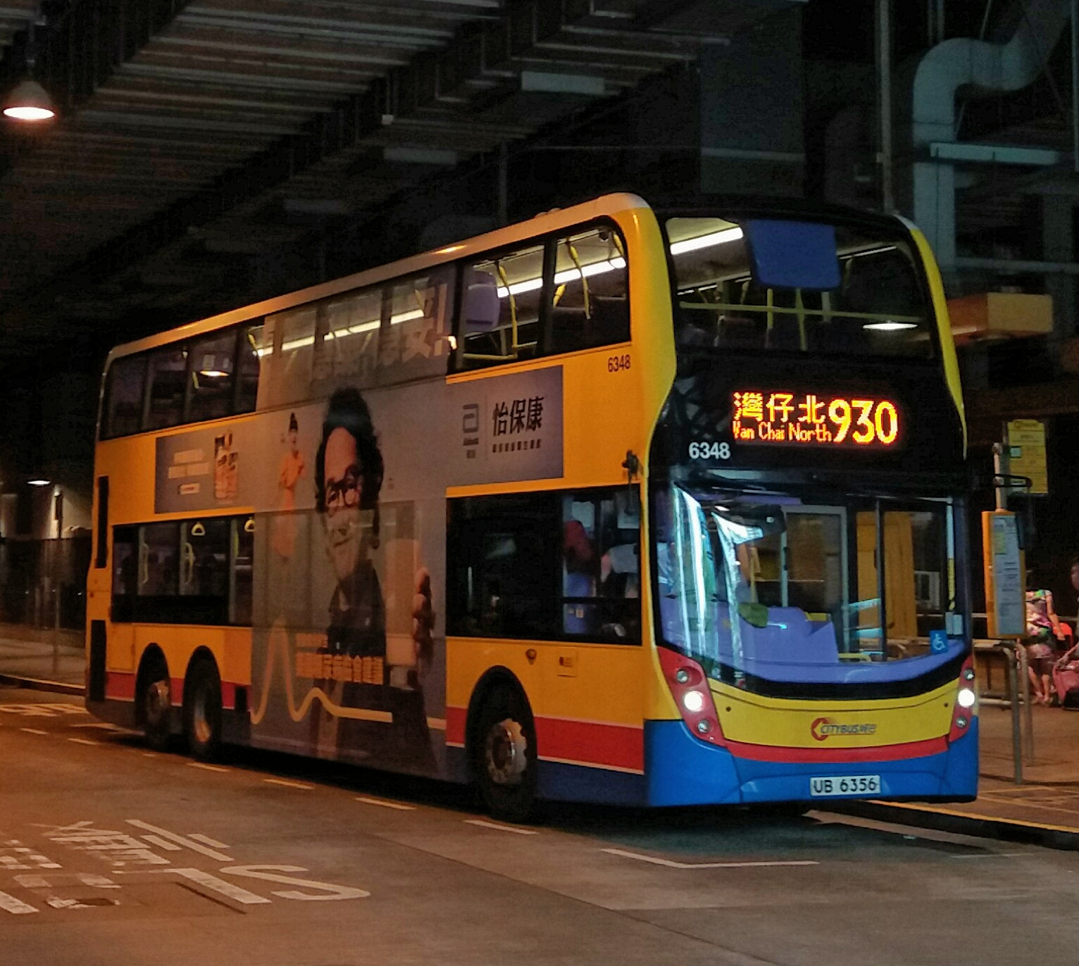 中文（香港）: 過海隧道巴士930線